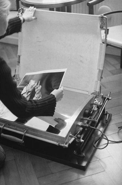 Pressung einer Fotovergrößerung im Format 30x40 cm von Andreas Bohnenstengel, Fotograf mit einer Barytpapier Trockenpresse